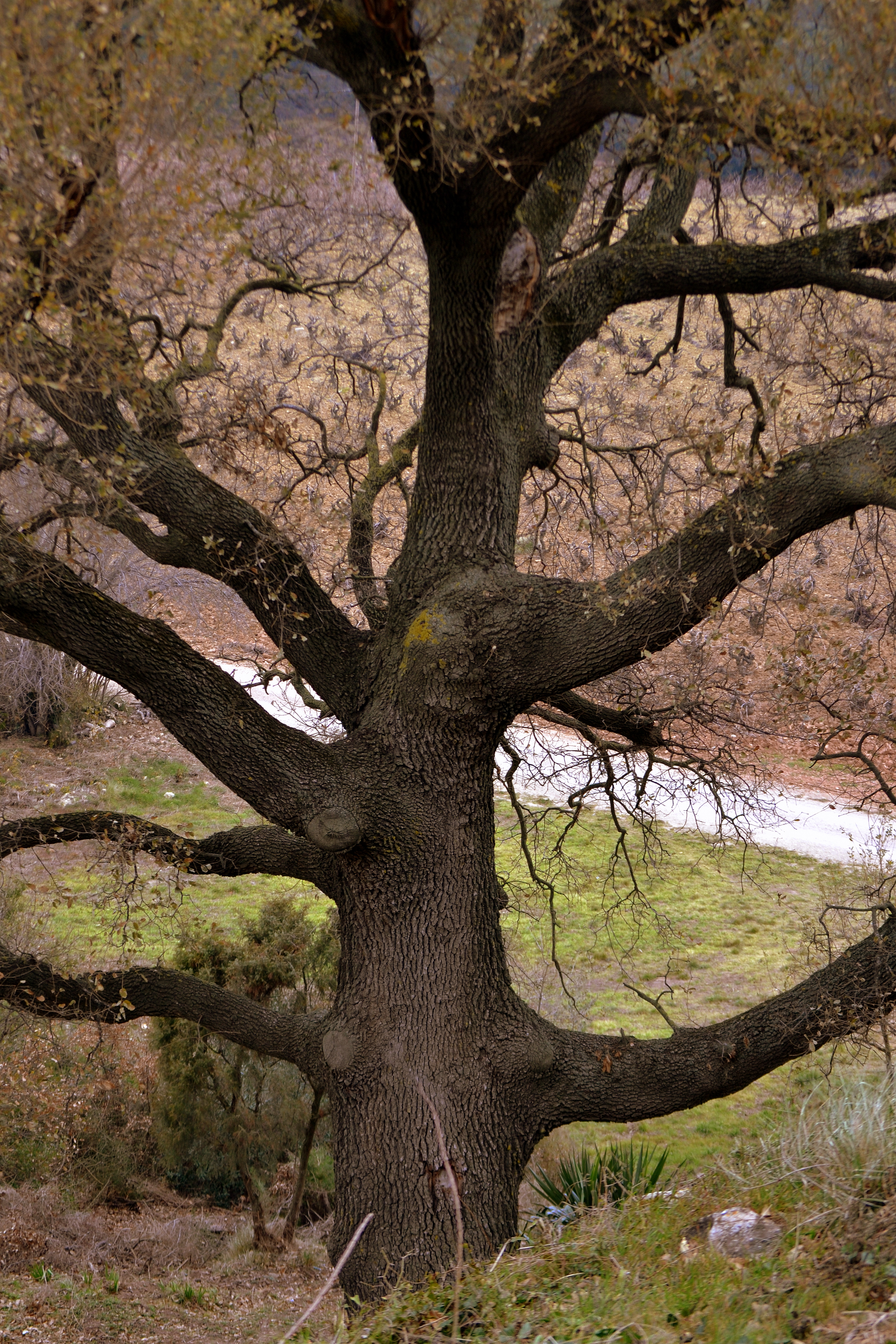 Roure de Claravalls